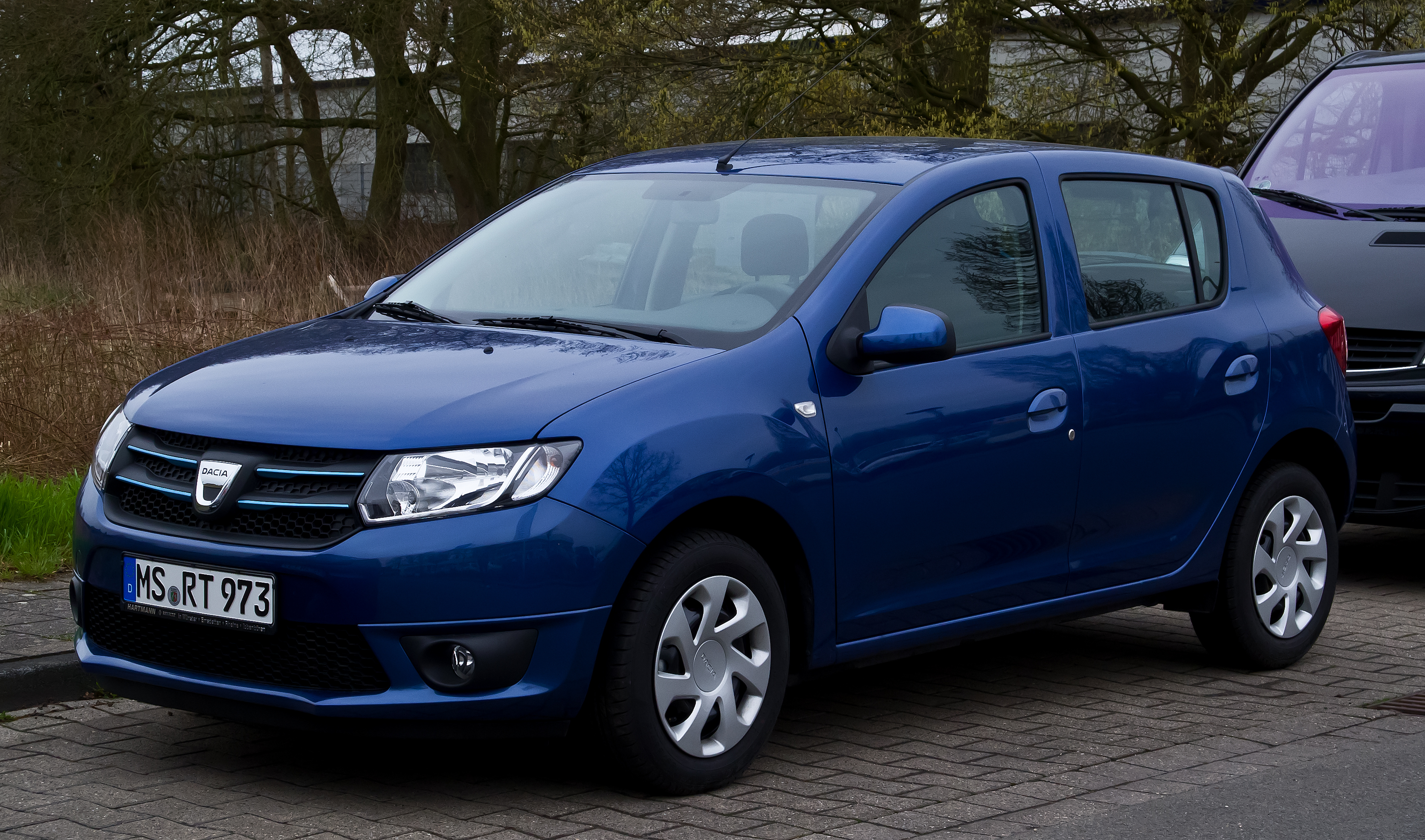 Dacia Sandero TCe 90 eco² Lauréate (II)